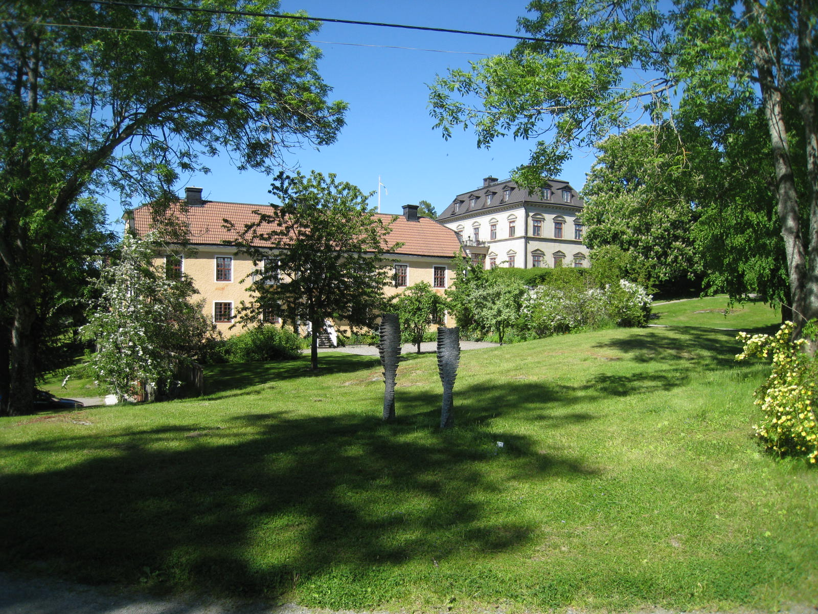 Edita Rydhag, Space in Time, Görvälns skulpturpark, Järfälla kommun, foto juni 2015.